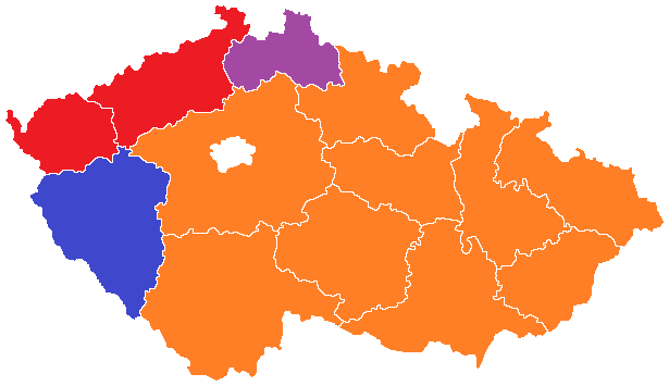 Volby do zastupitelstev krajů v roce 2012 - vítězné strany v jednotlivých krajích (oranžová ČSSD, červená KSČM, modrá ODS, fialová Starostové pro Liberecký kraj)